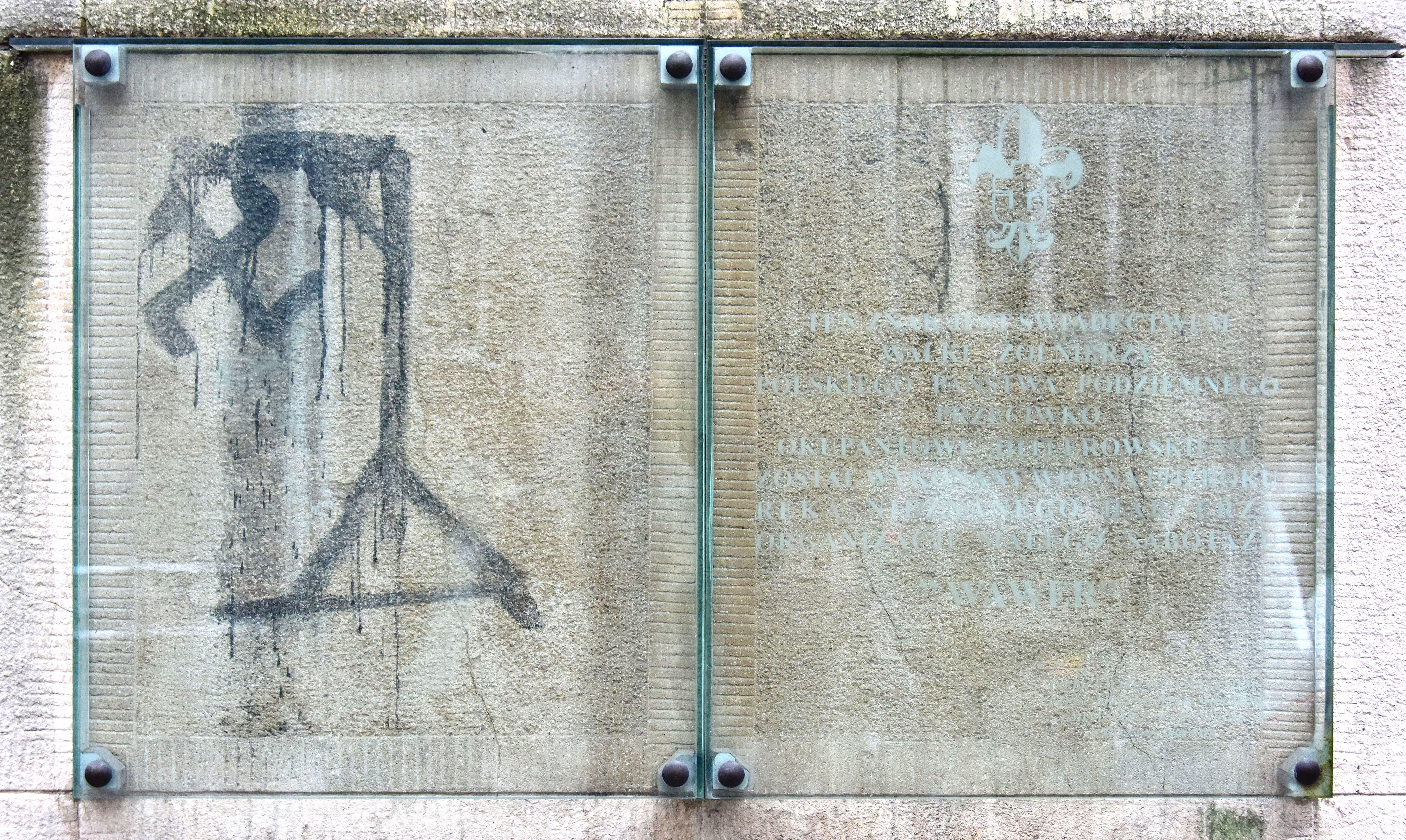 Zachowana swastyka na szubienicy namalowana na budynku przy ul. Ligockiej róg Króżańskiej w Warszawie